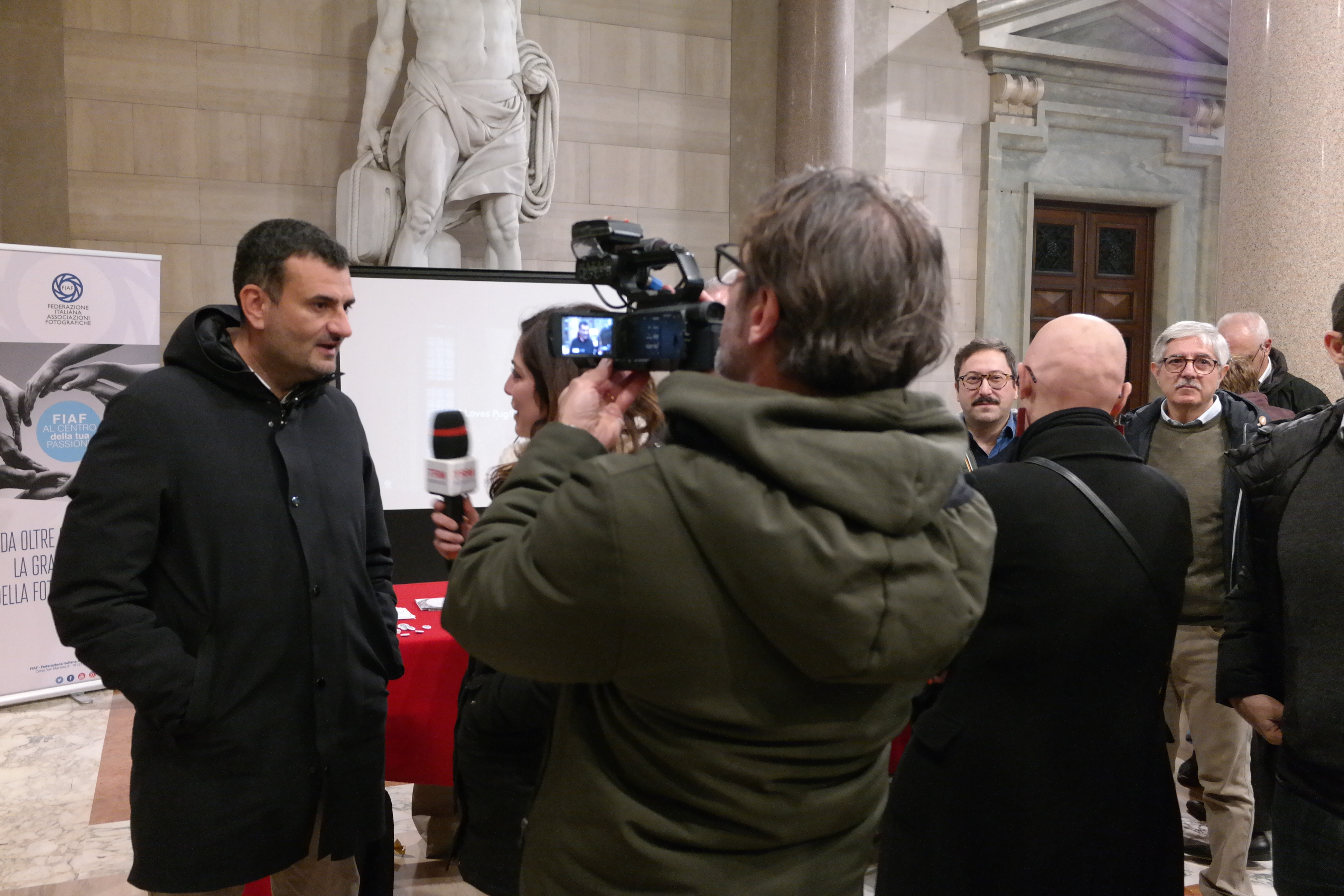 Sindaco Antonio Decaro alla mostra Wiki Loves Puglia 2019